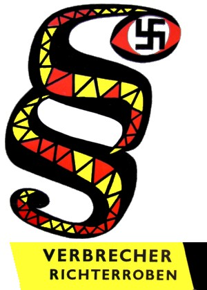 Verband der antifaschistischen Widerstandskaempfer